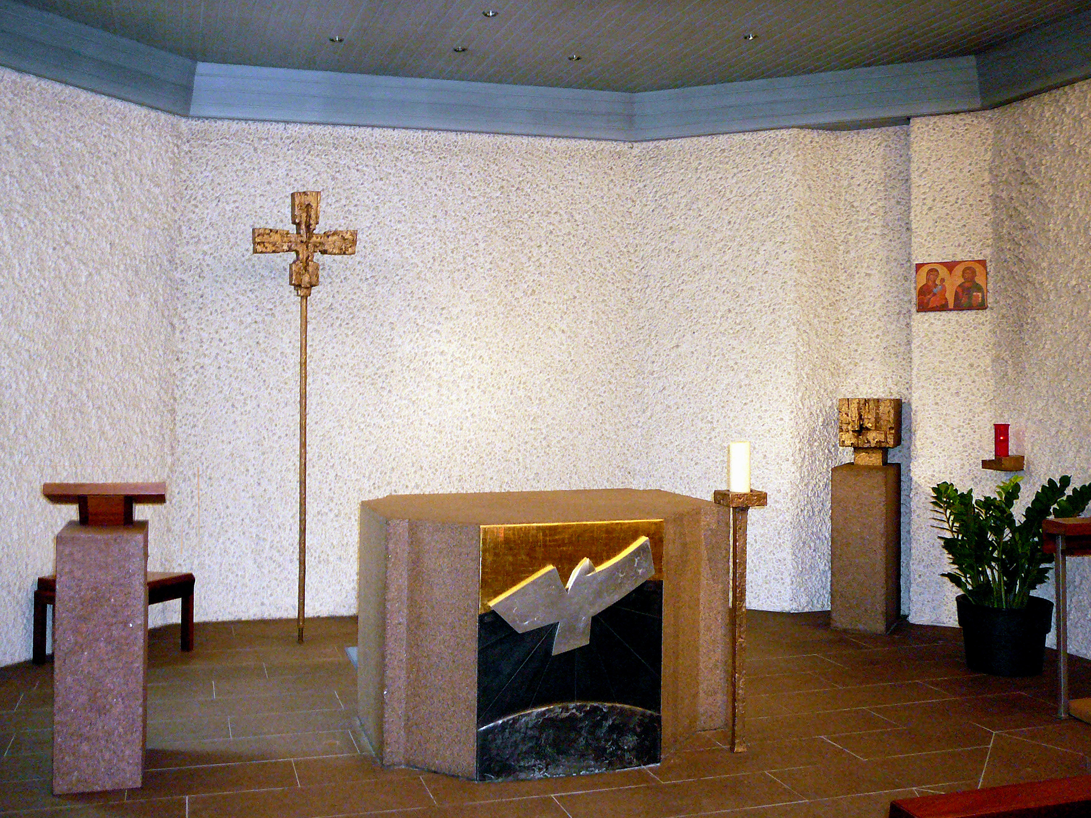 Römisch-katholische Pfarrkirche St. Katharina Zürich-Affoltern, Krypta, Altarraum mit Relief von Franco G. Giacomel